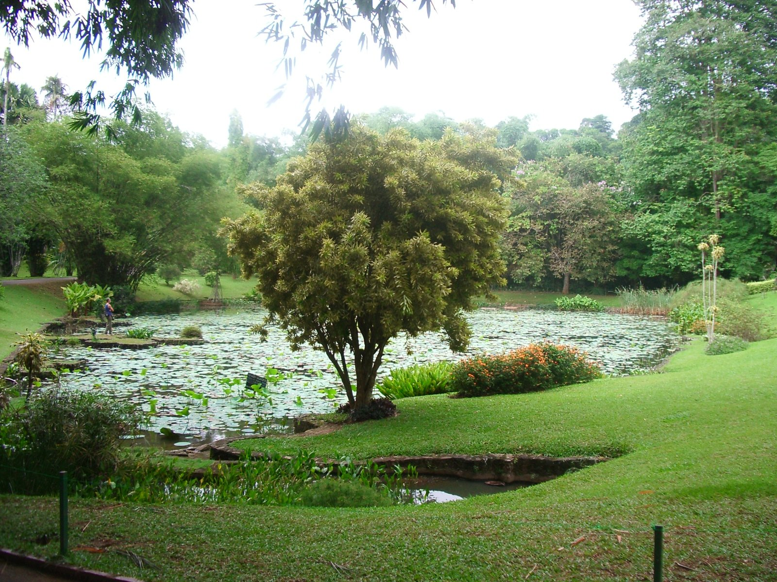 Jardi botanic de Peradeniya a la provincia central, prop de Kandy, Sri Lanka, imatge feta per J. Olle el juliol del 2006